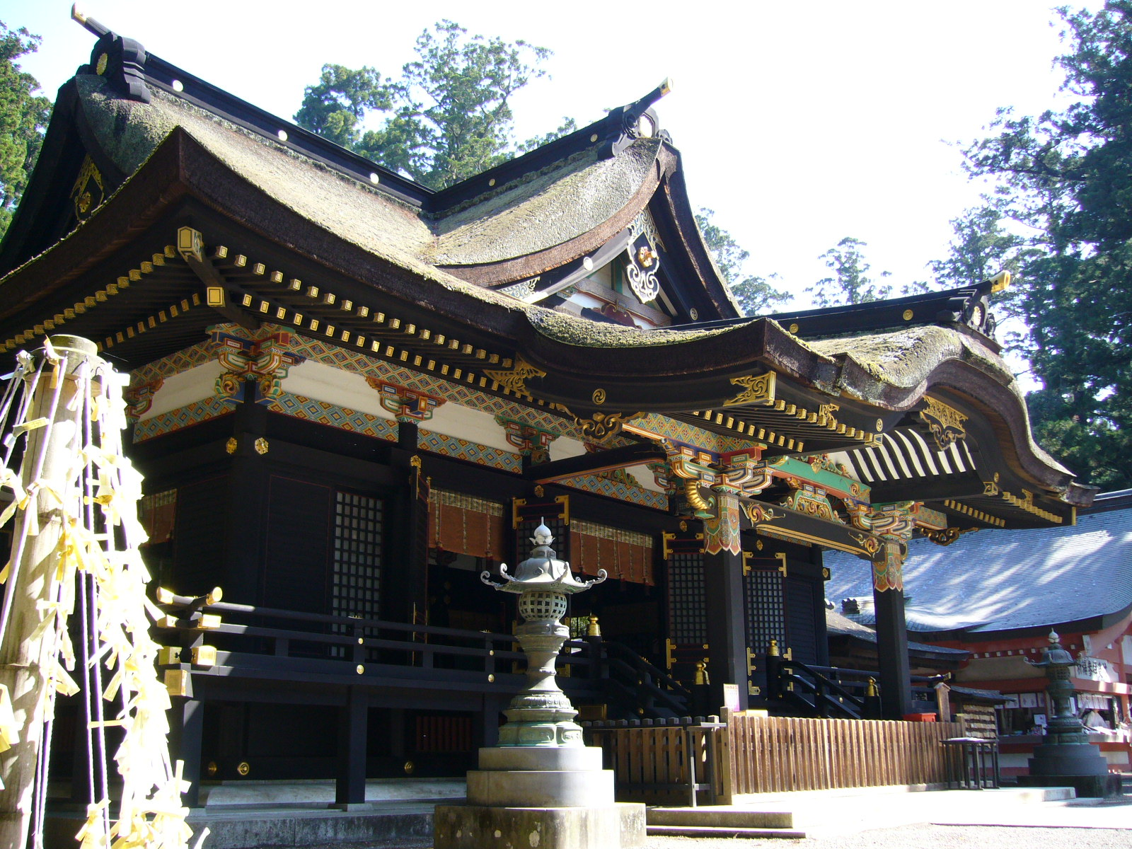 katori-jinguu-shrine-haiden,katori-city,japan